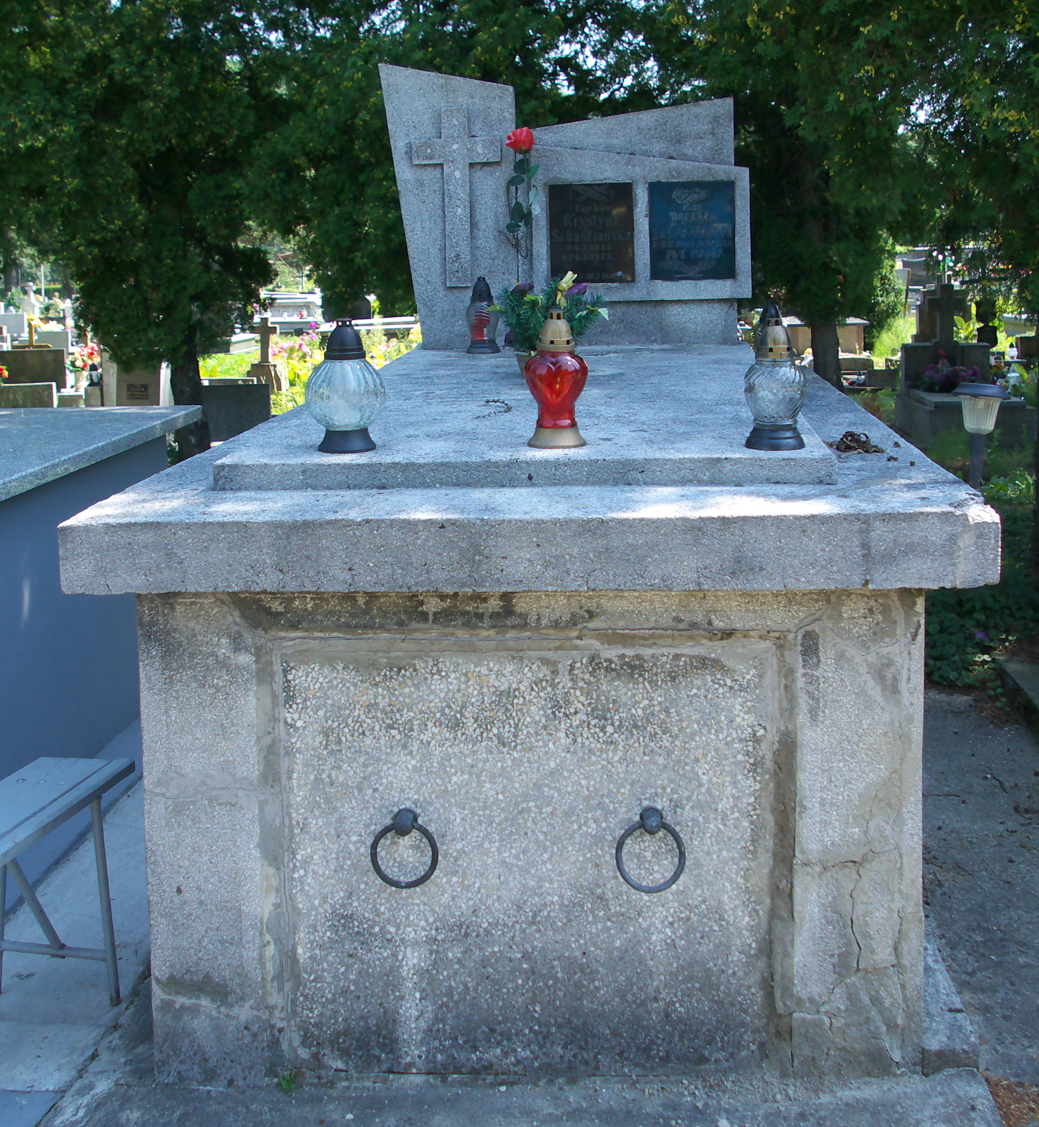 Grobowiec Krystyny i Mariana Sebastiańskich na Cmentarzu Centralnym w Sanoku